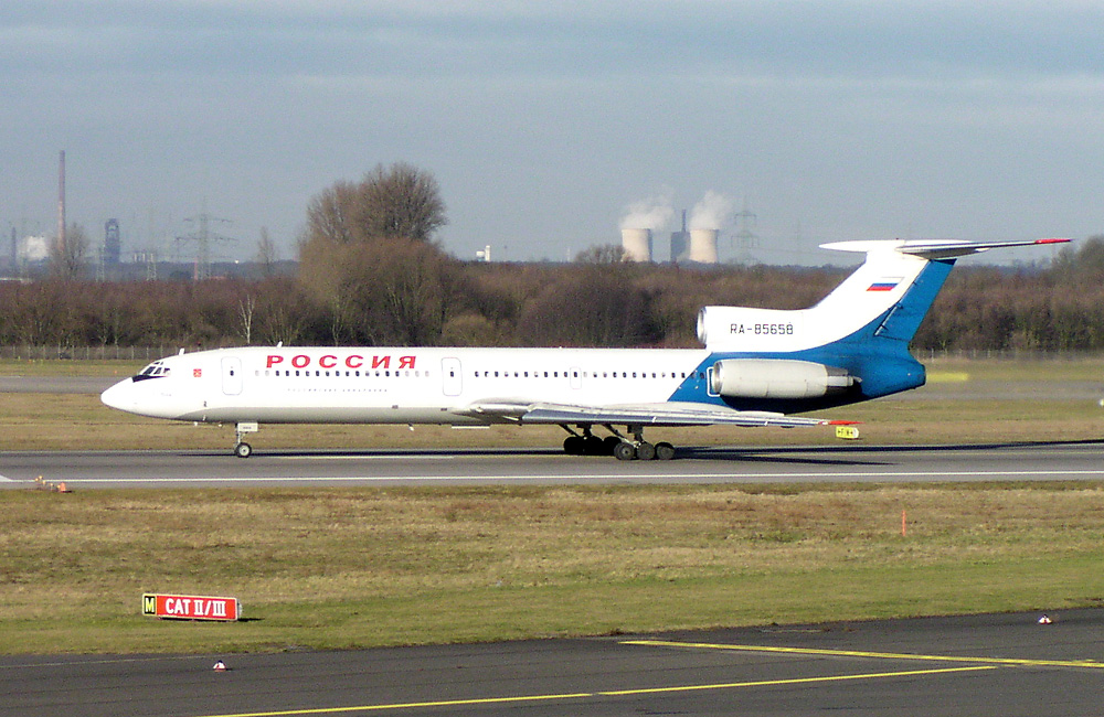 Rossija Tupolew Tu-154M (RA-85658) in Düsseldorf (EDDL/DUS)